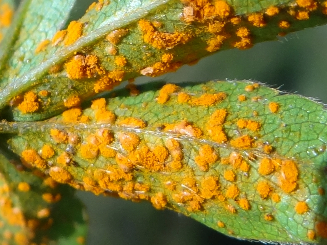 Phragmidium potentillae on leaf Potentilla alpina. Location: Slovakia, Nízke Tatry, Veľká hoľa